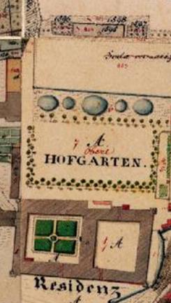 historische Flurkarte: Kempten, Hofgarten mit Residenz im Süden